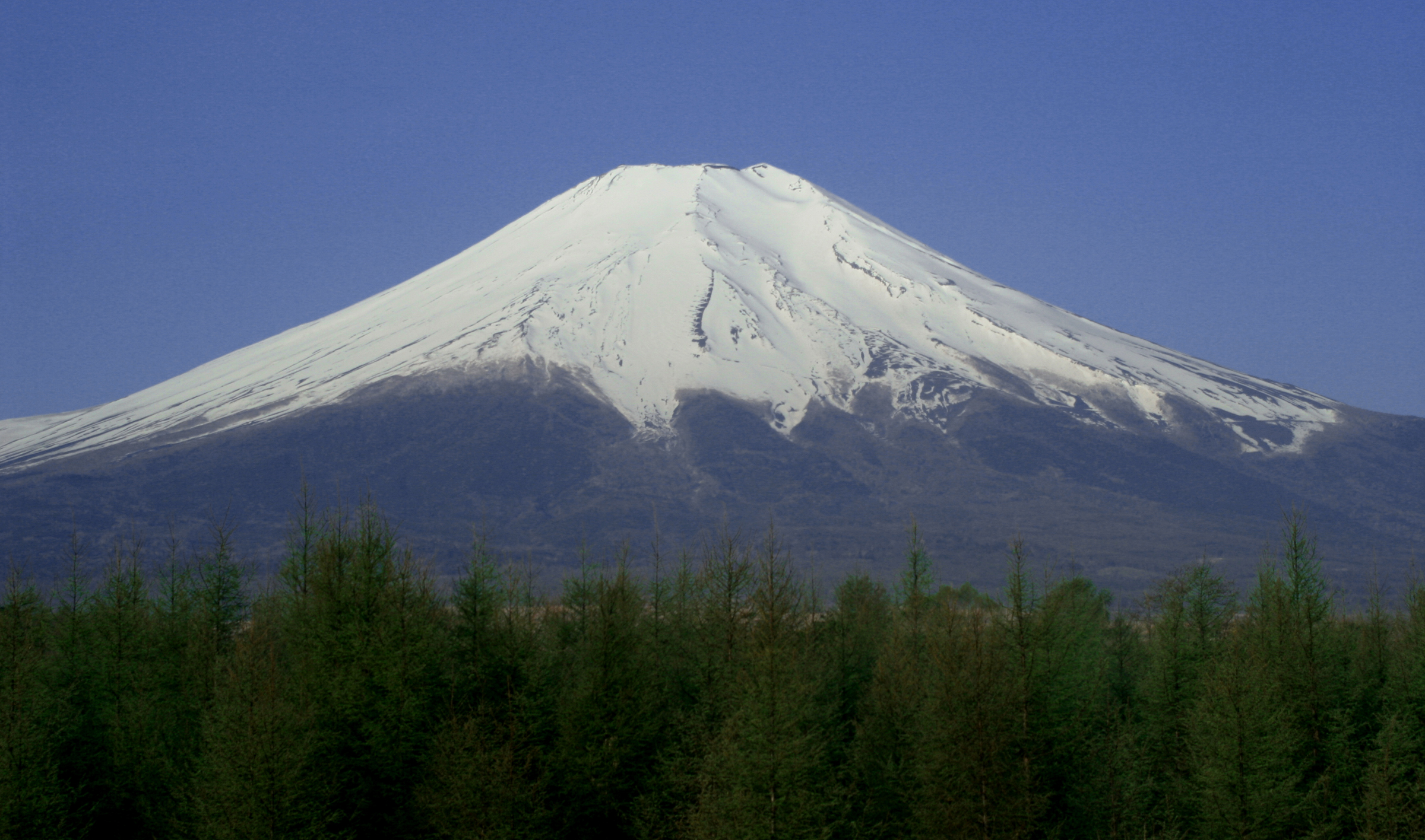 Mt. Fuji from Yamanaka - 2